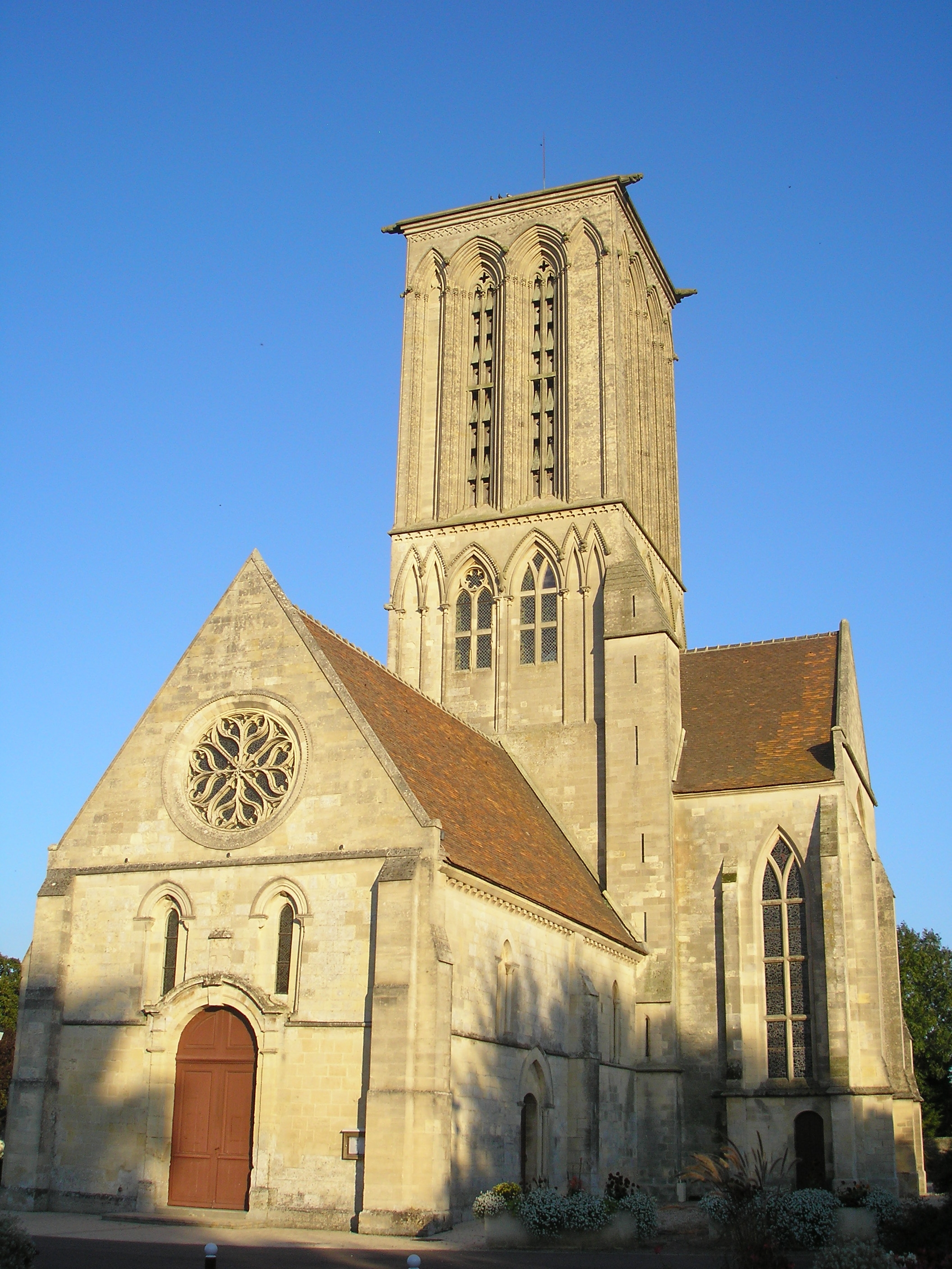 Saint-Manvieu-Norrey (Normandie, France). L'église Notre-Dame-des-Labours de Norrey-en-Bessin.